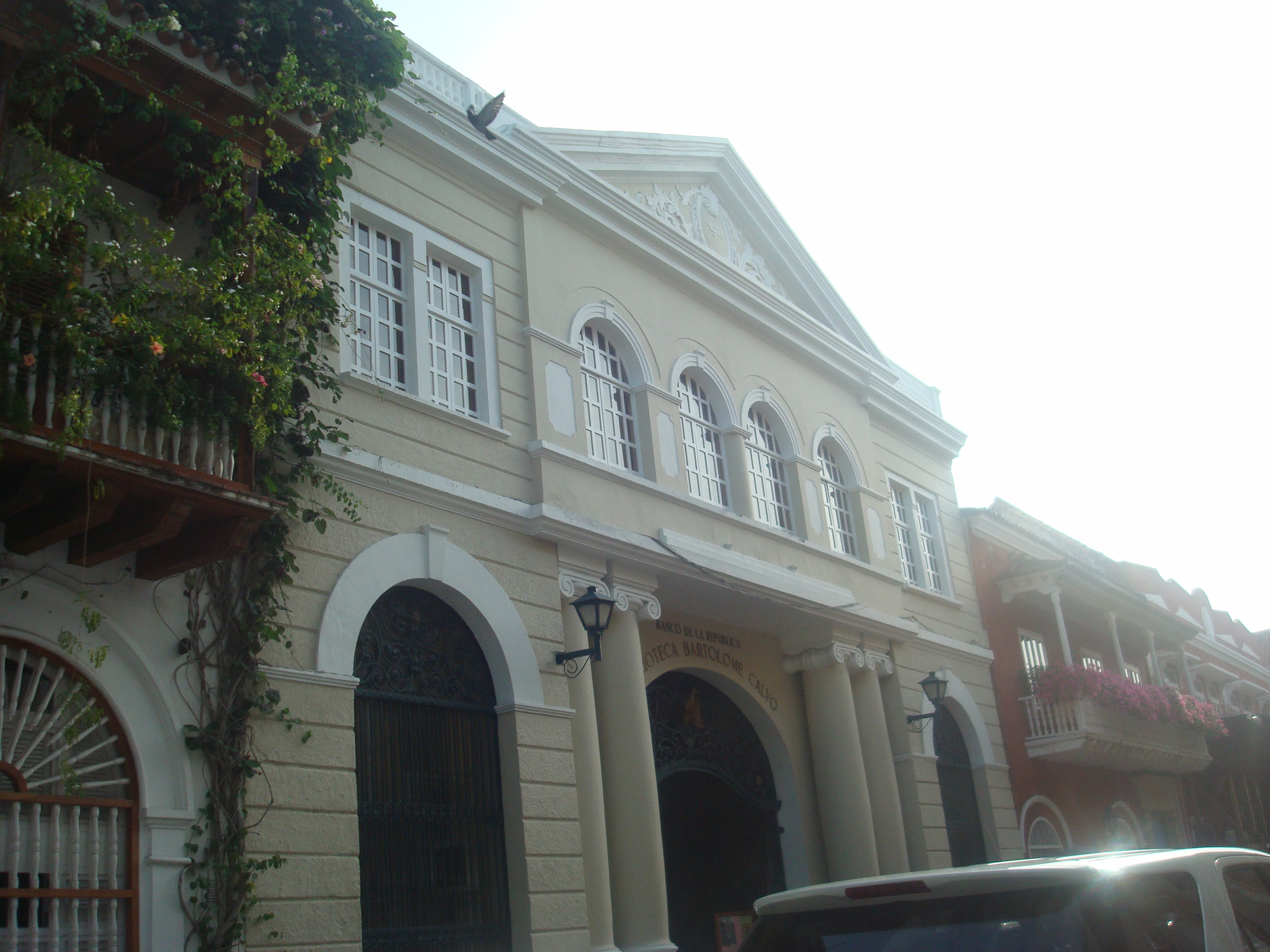 Banco de la República - Biblioteca Bartolomé Calvo